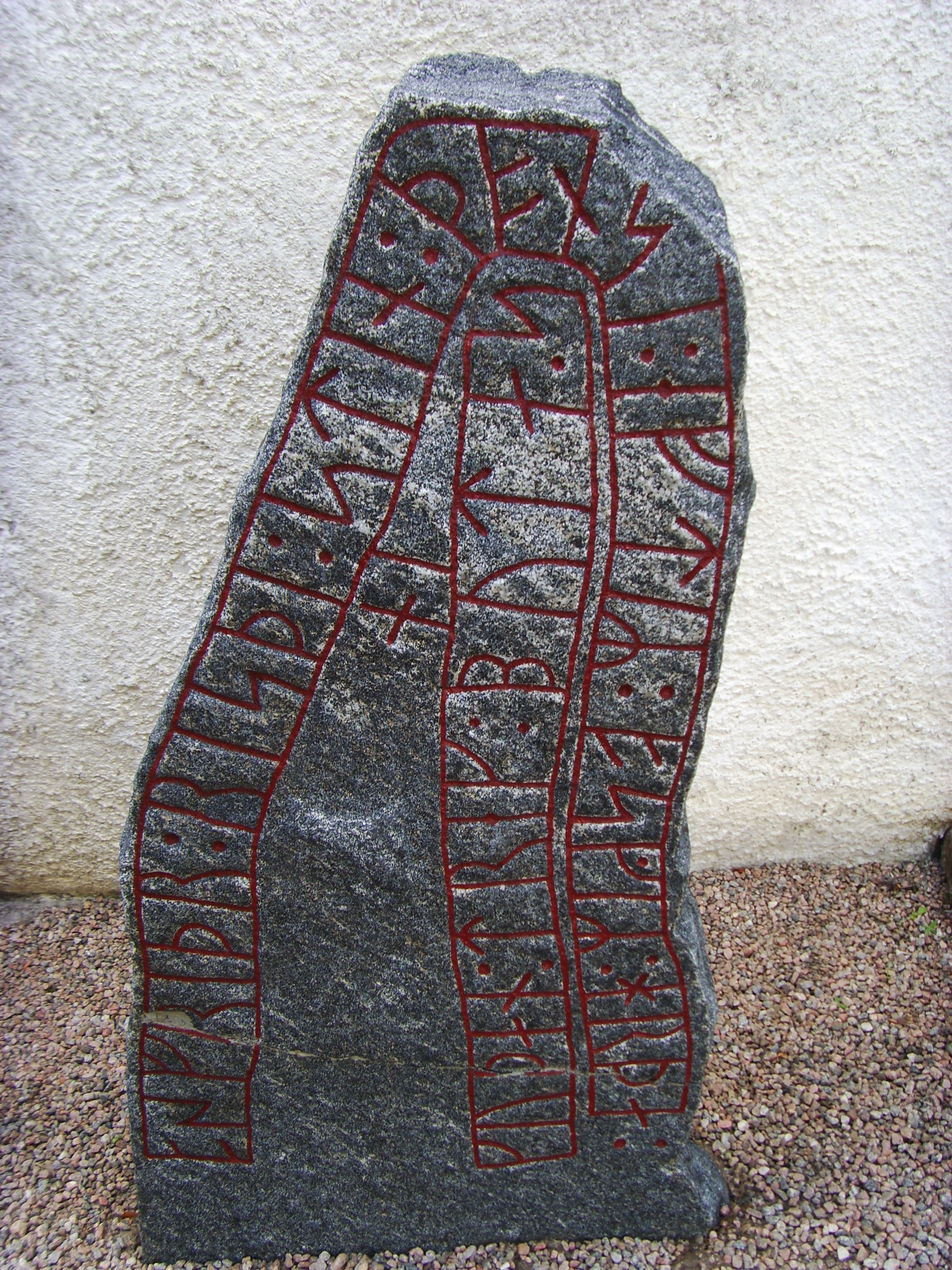 Runstenen RAÄ Fölene 3:1 (Vg 154) är placerad till vänster om ingången till Fölene kyrka.